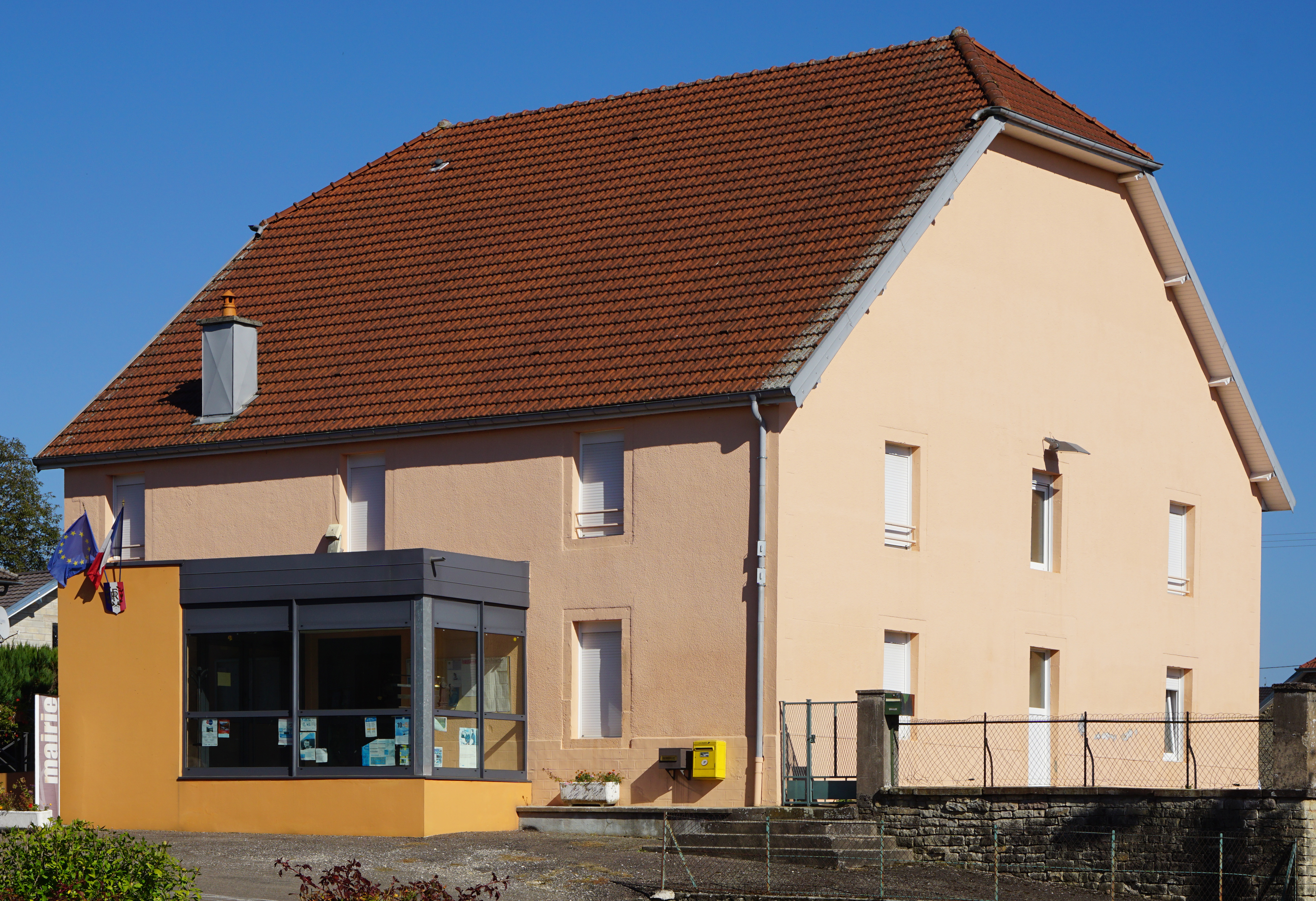 La mairie de Adelans-et-le-Val-de-Bithaine.